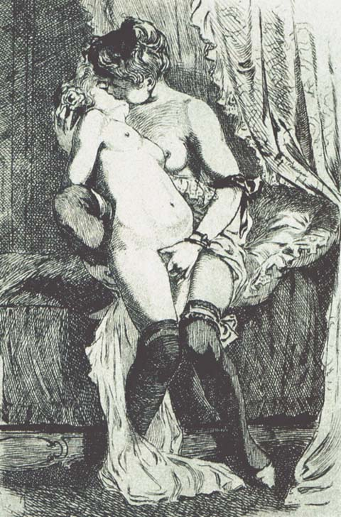 Dessin de Martin van Maële. Illustration d'un poème de Paul Verlaine. 1907. Belgique.